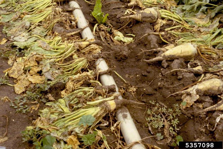 Symptômes de rhizomanie dus à Beet Necrotic Yellow Vein Virus (BNYVV) sur betteraves sucrières.